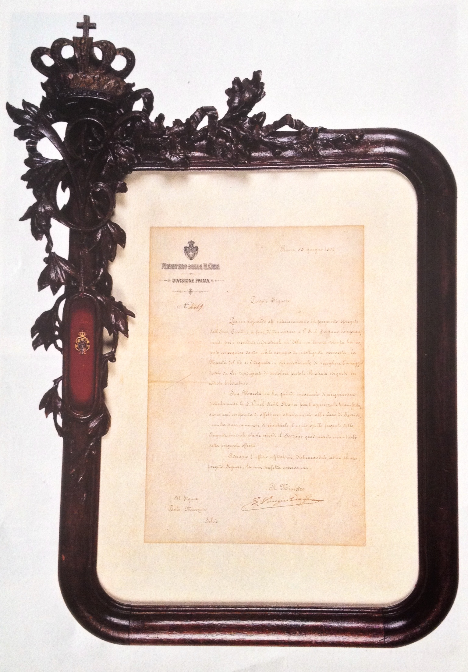 Lettera del Ministro della Casa Reale a Paolo Marzari. Giugno 1902 Lettera del Ministro della Casa Reale a Paolo Marzari